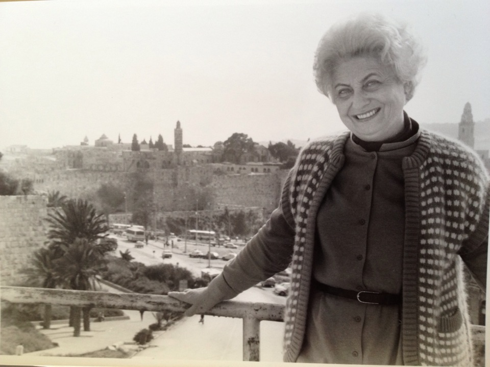 תמר אשל על גג עיריית ירושלים, 1977